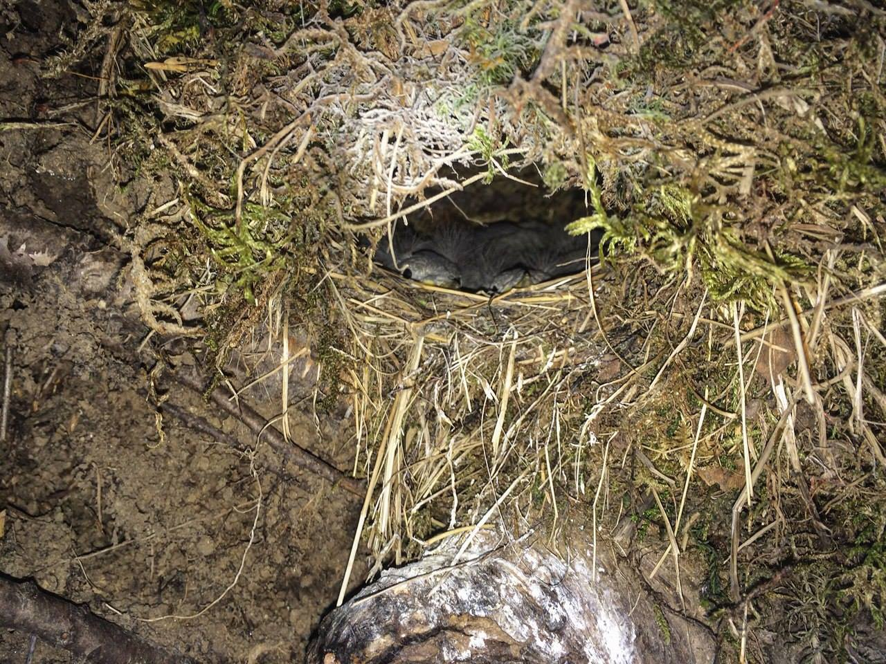 Гнездо оляпки под выворотнем